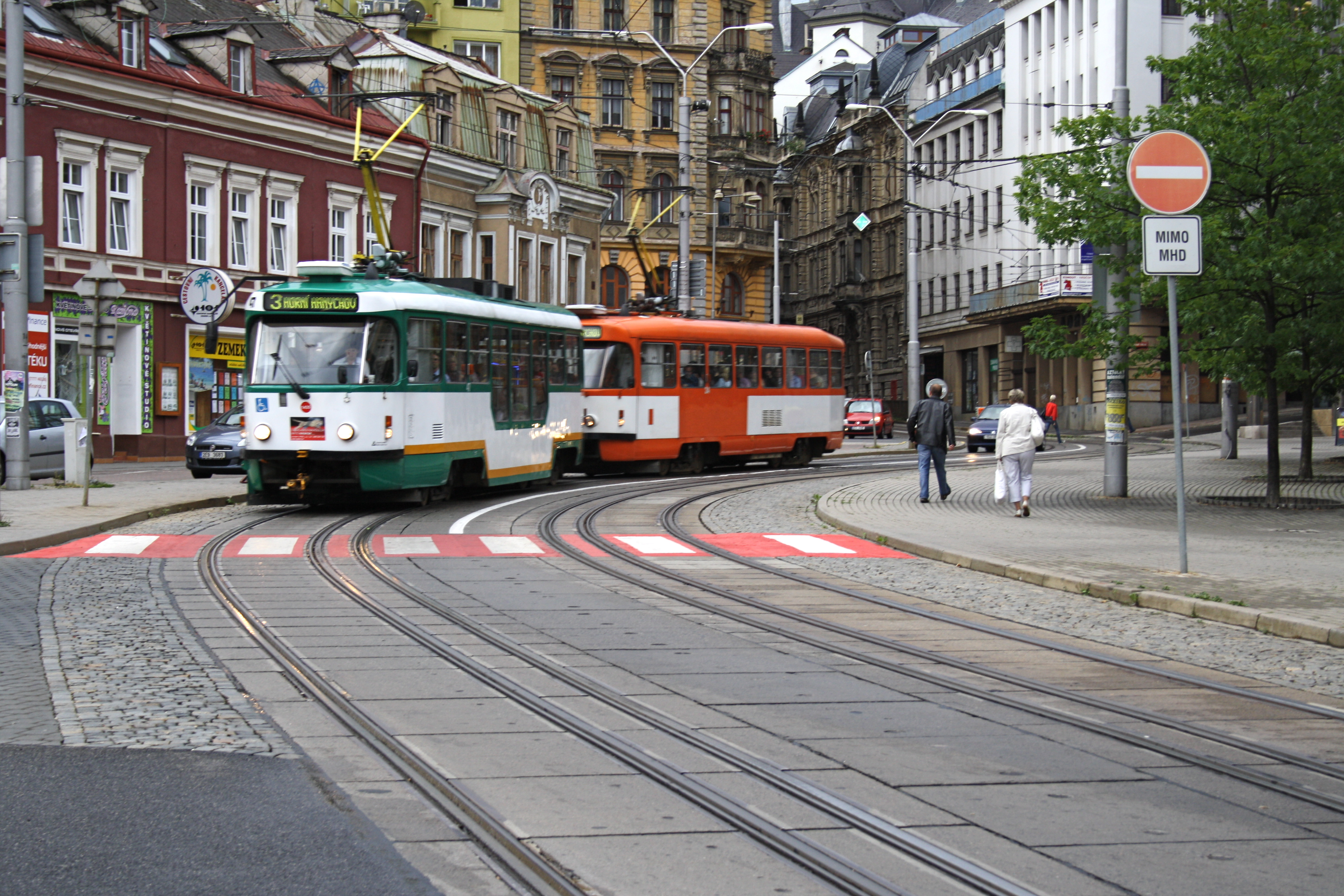 Straßenbahn in Liberec